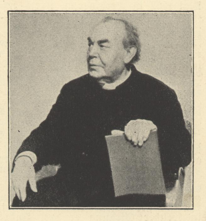 Dr. Albert Ehrhardt, deutsch-elsässischer Priester und Kirchengeschichtler